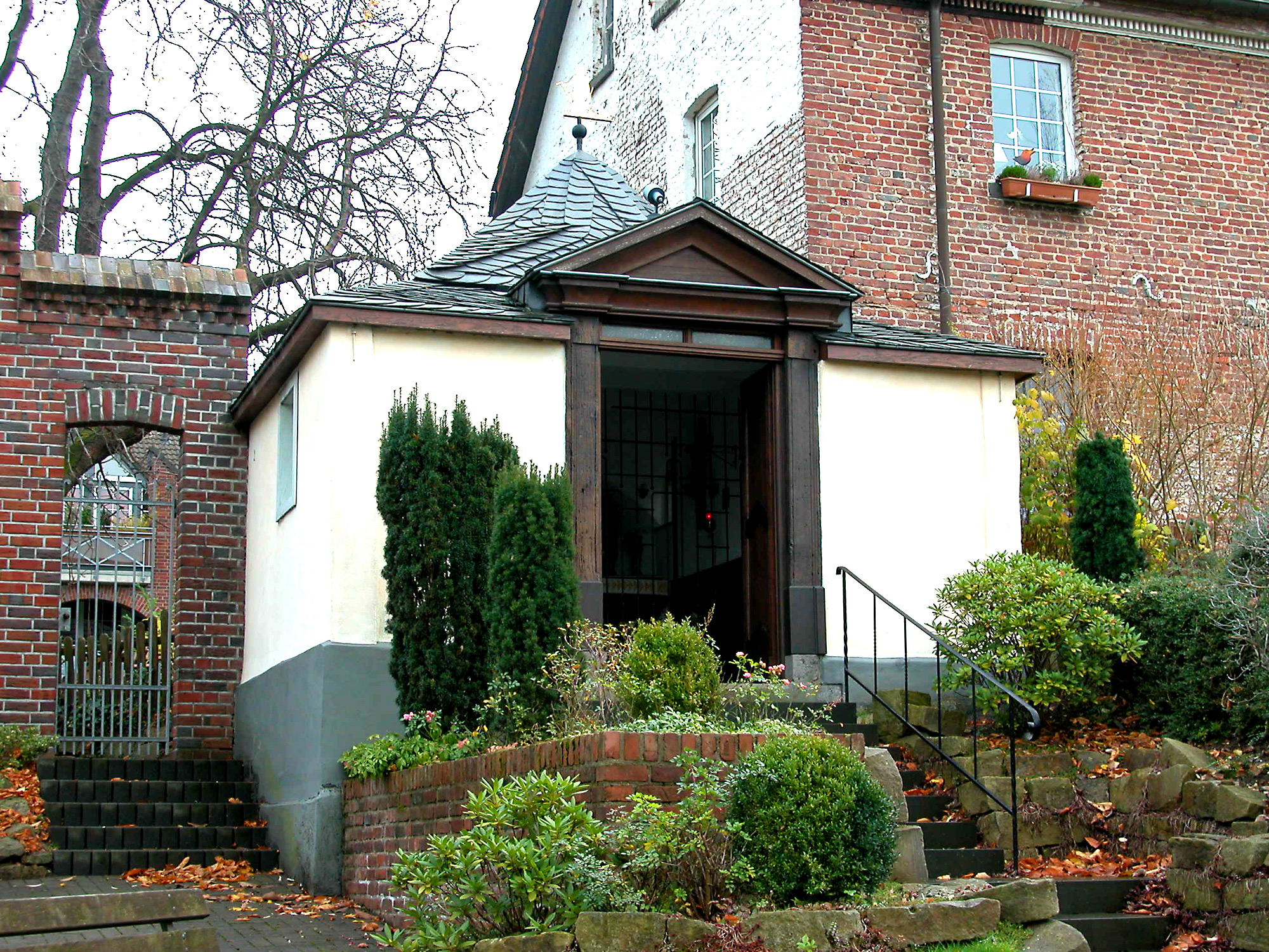 St. Josef Kapelle, Monheim am Rhein, NRW, Deutschland (Germany)